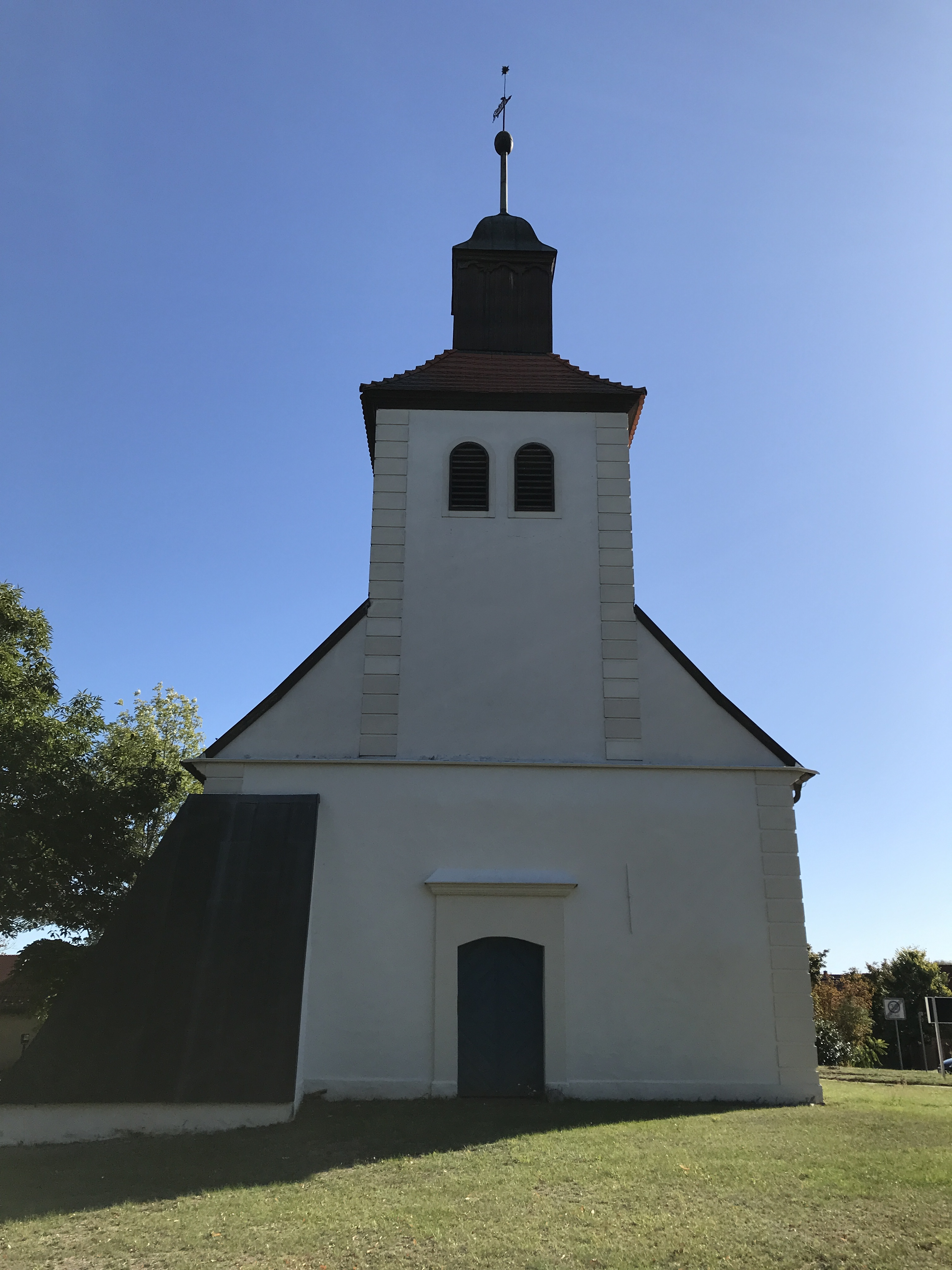 Die Dorfkirche Mixdorf in der gleichnamigen Gemeinde im Landkreis Oder-Spree ist eine Saalkirche aus den Jahren 1719/1720. Im Innern steht unter anderem ein Kanzelaltar aus dem Jahr 1725.